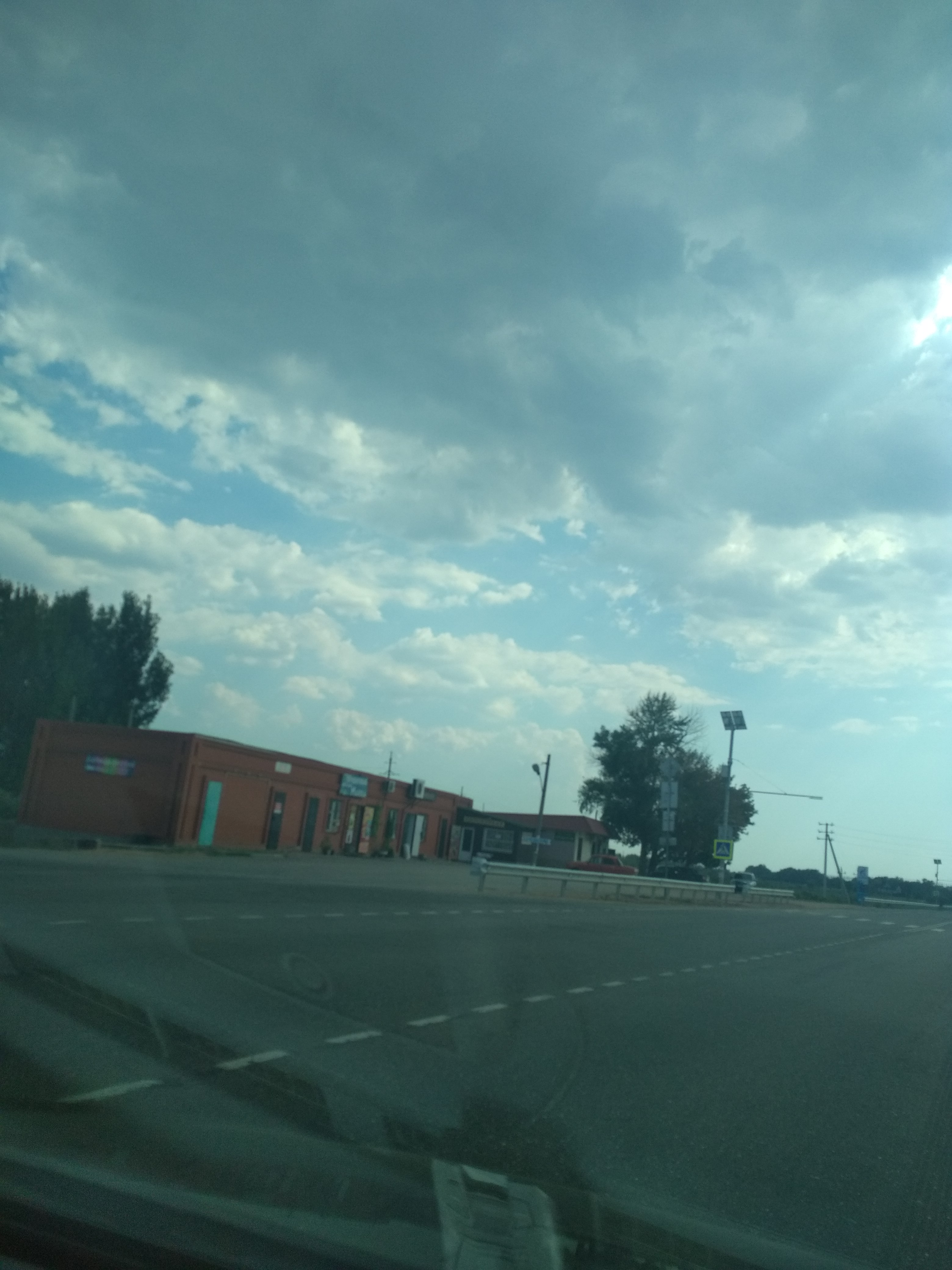 Нохчийн: Магазины Тулугановки